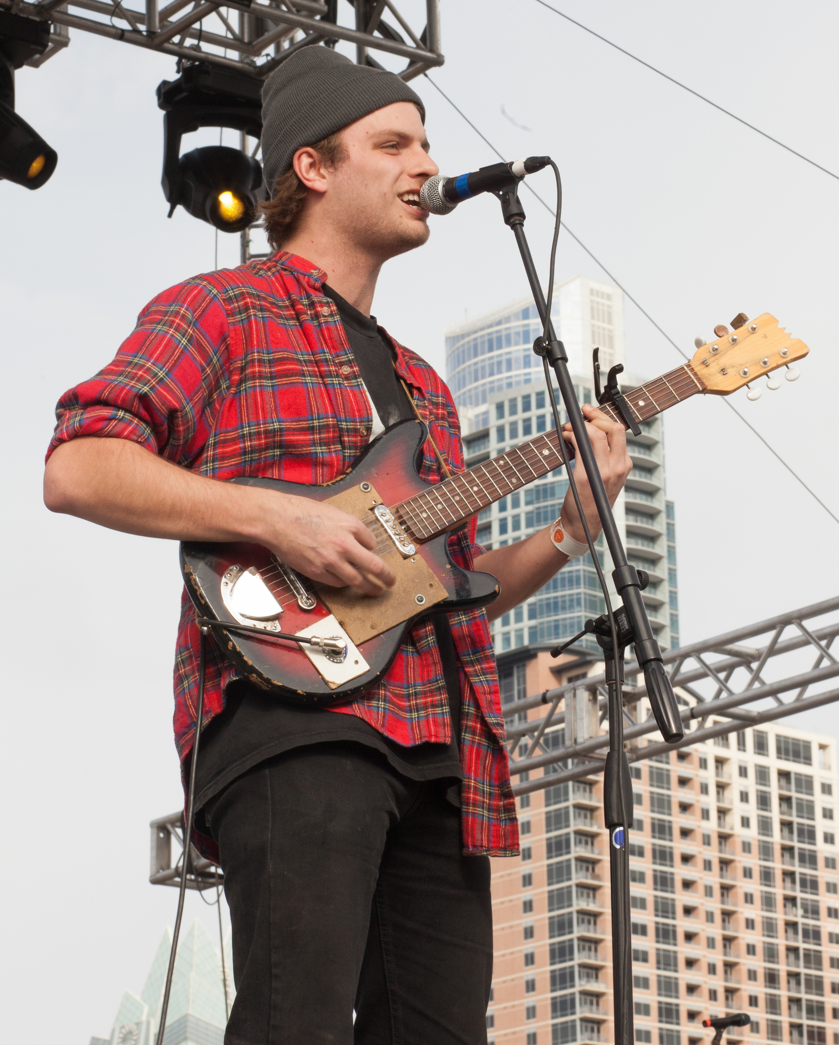 Mac Demarco